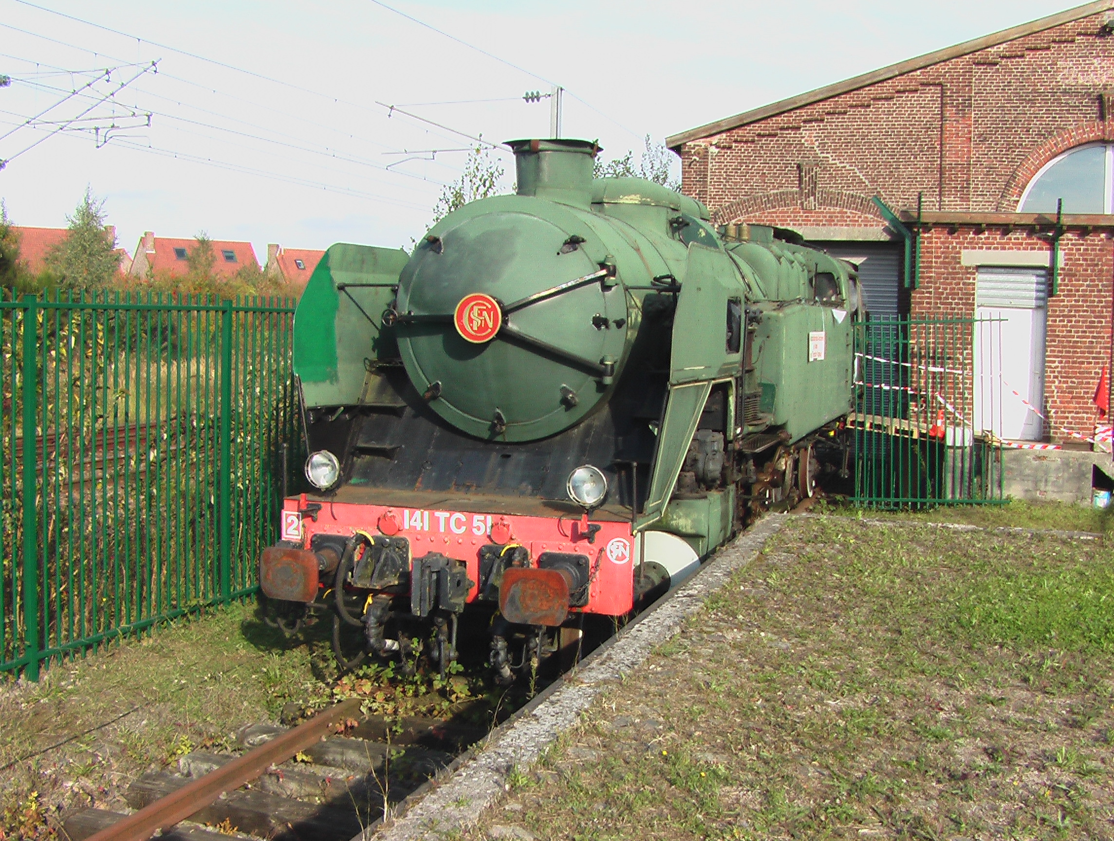 Locomotive à vapeur de type 141 TC 51 en gare d'Ascq.